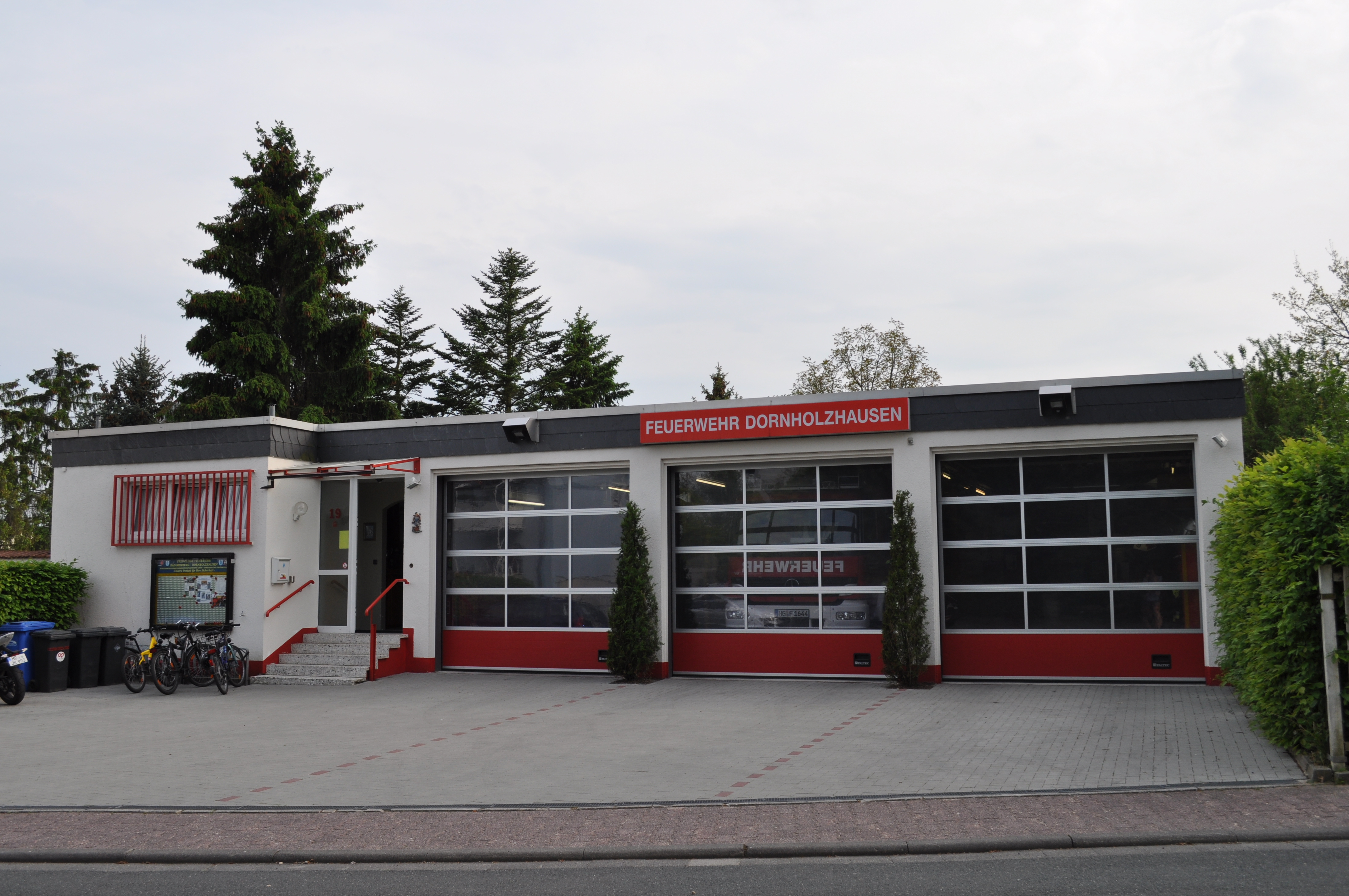 Feuerwehrgerätehaus Dornholzhausen (Bad Homburg)